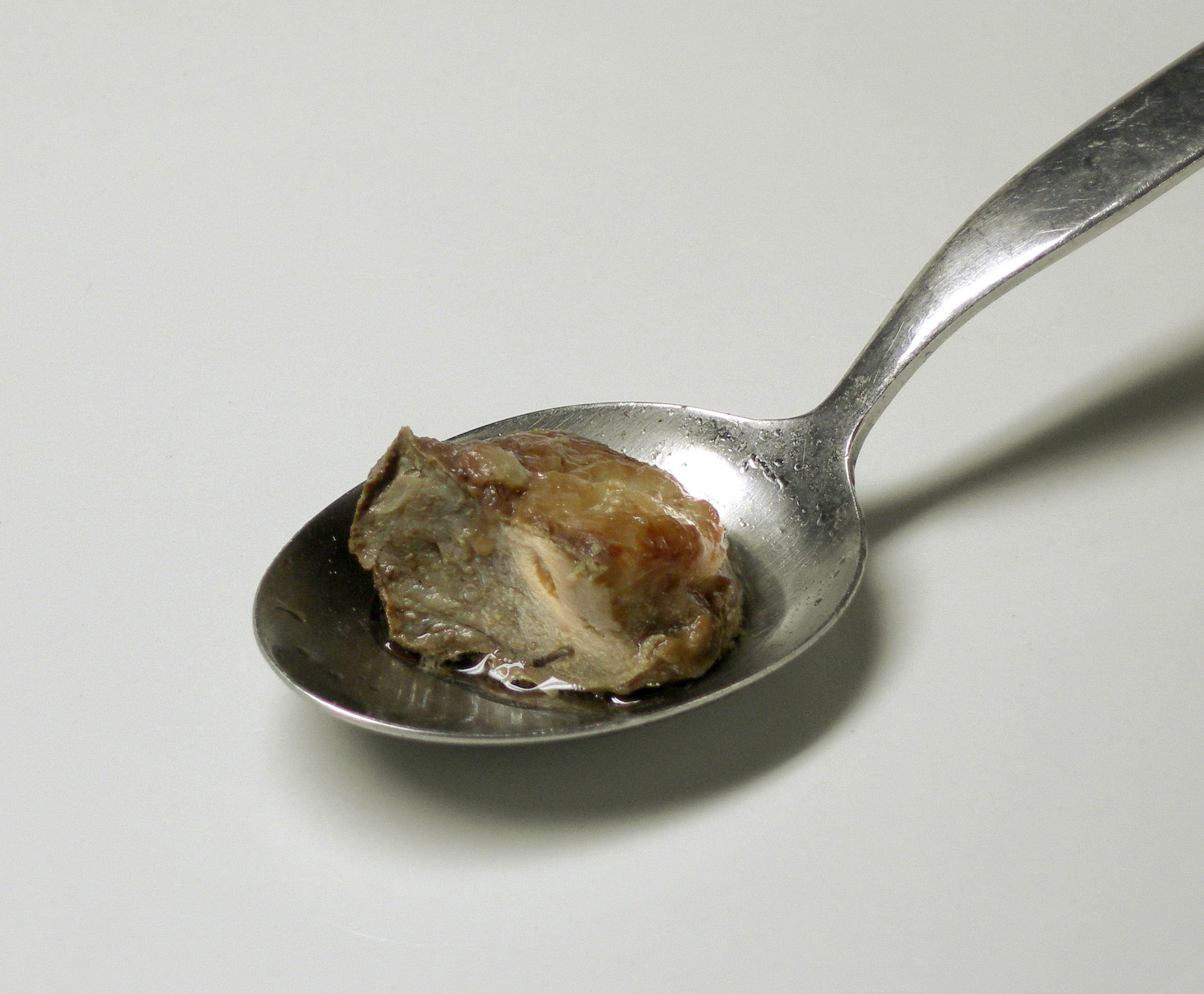 Bone marrow, boiled (gekochtes Knochenmark)